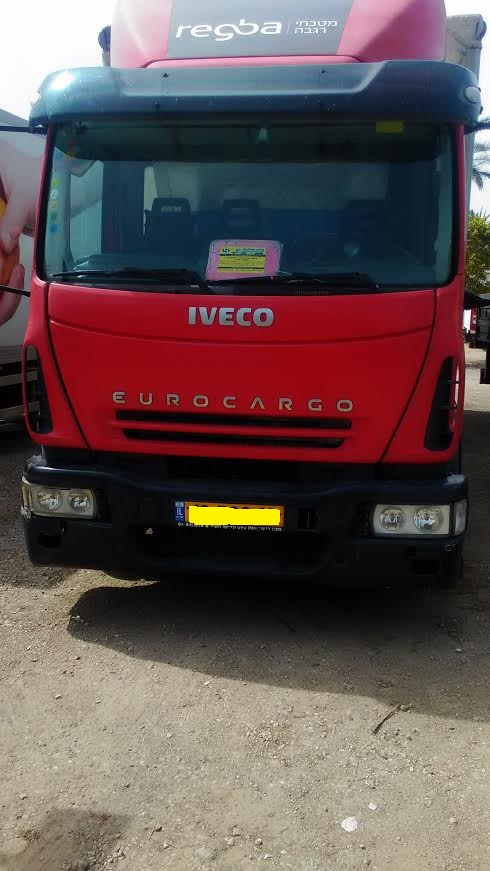 איווקו